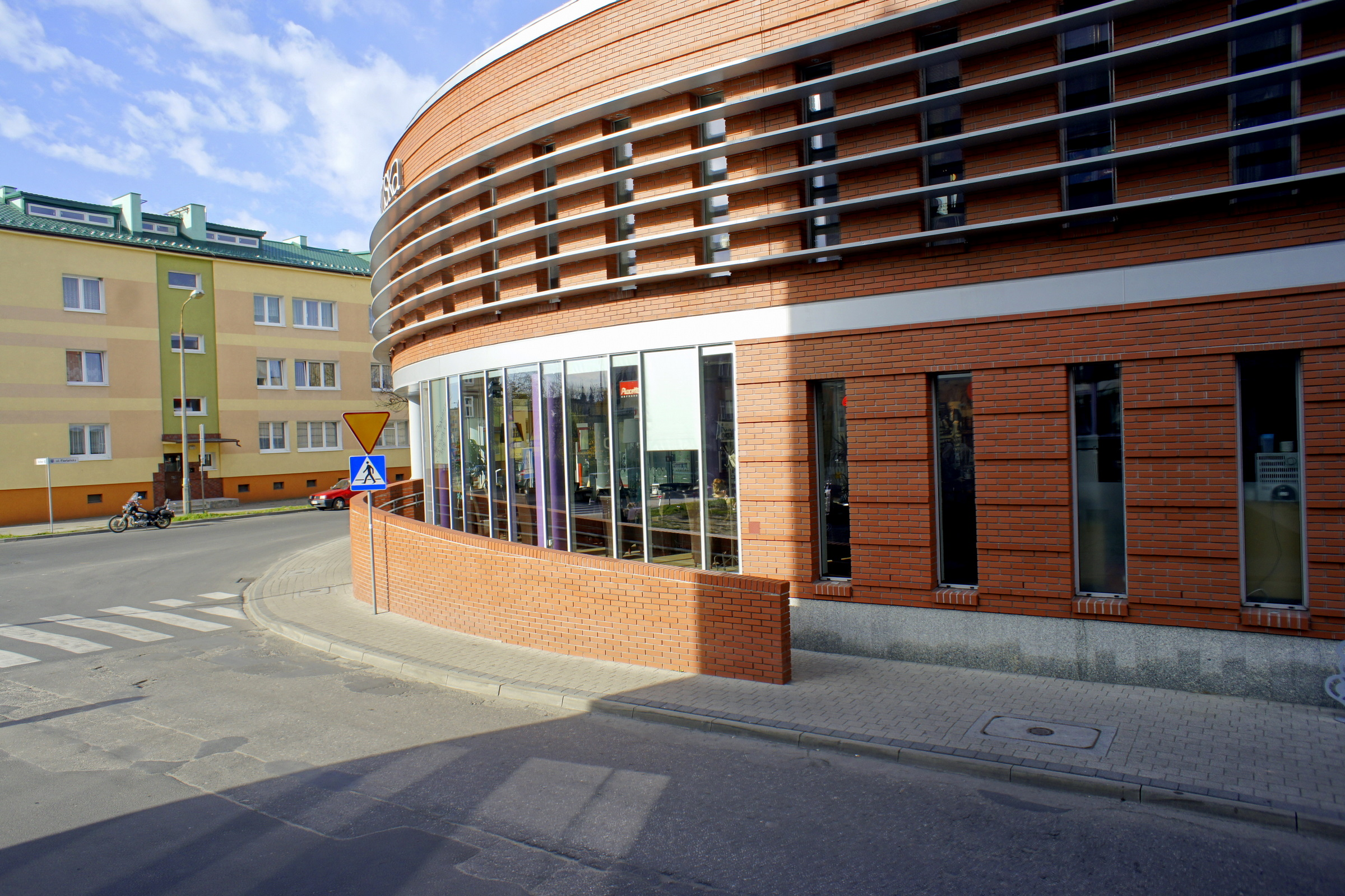 Krotoszyn ( woj. wielkopolskie ). Zbieg ulic: Słodowej i Floriana z budynkiem centrum handlowego.